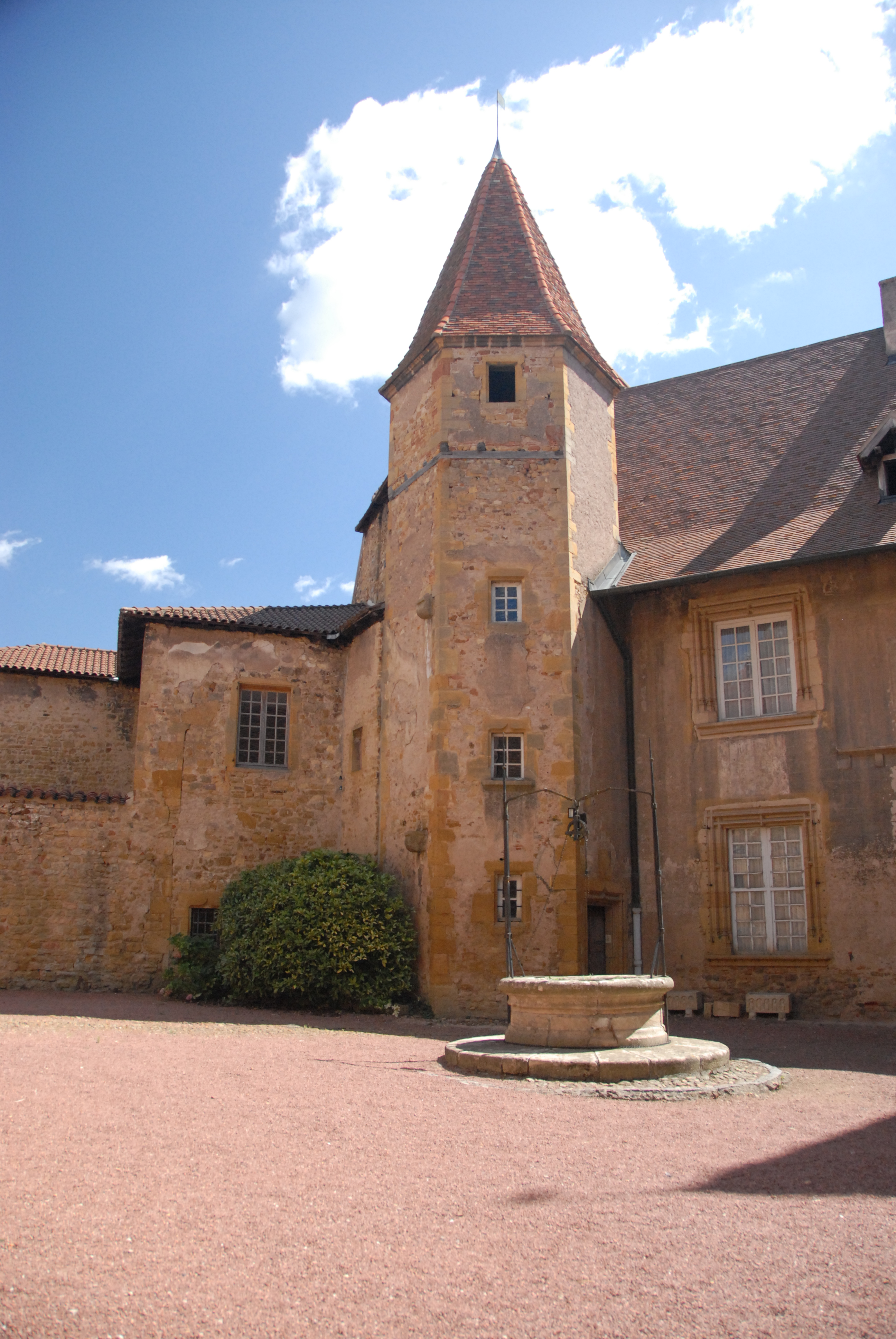 Wirtschaftshof, Haus des Abtres